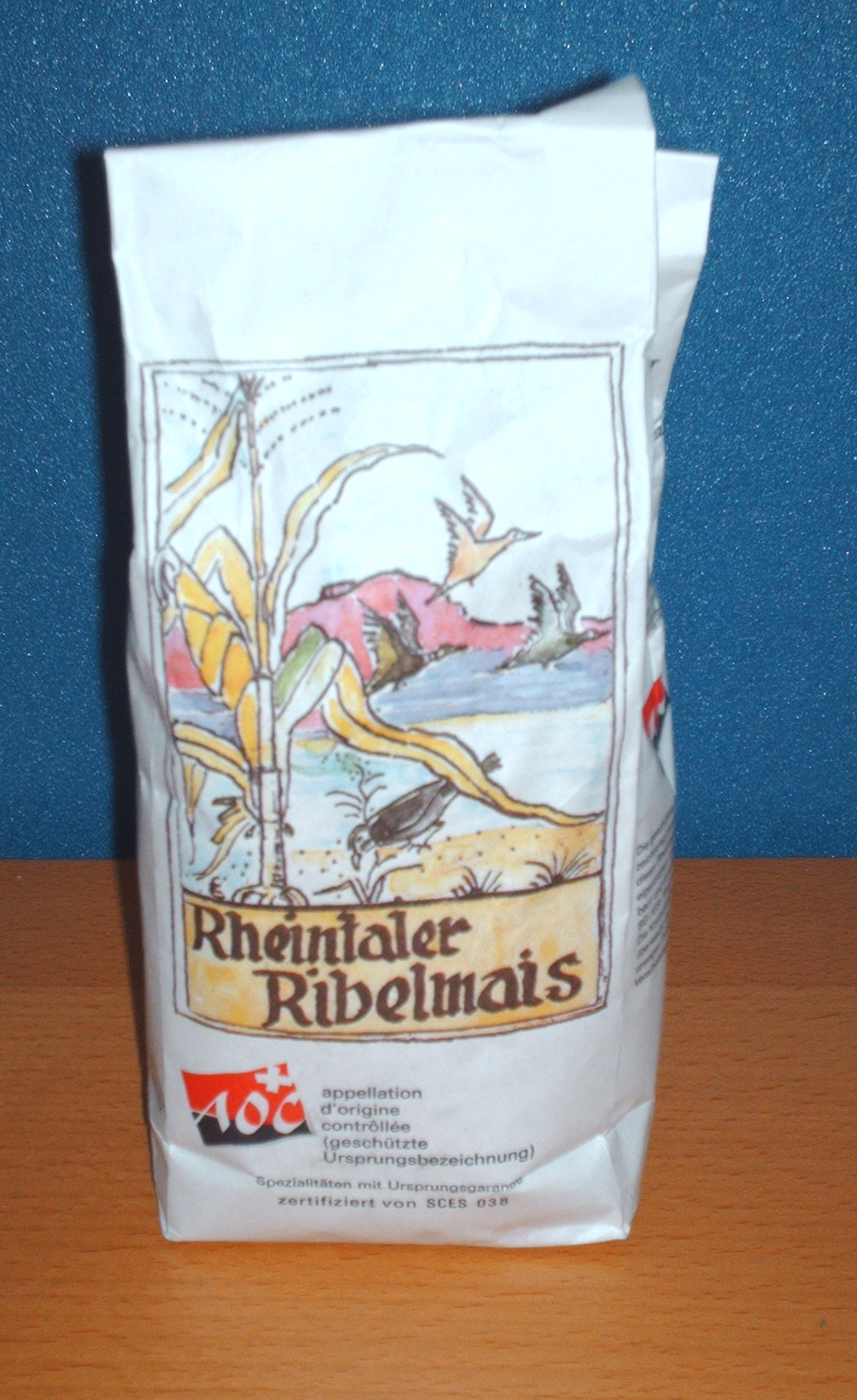 Rheintaler Ribel Corn Bag